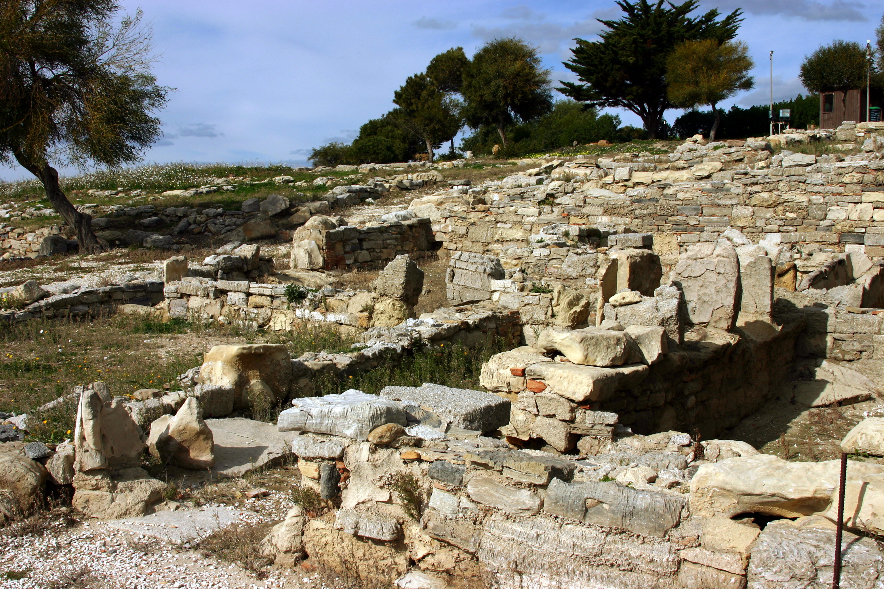 Heraclea Minoa